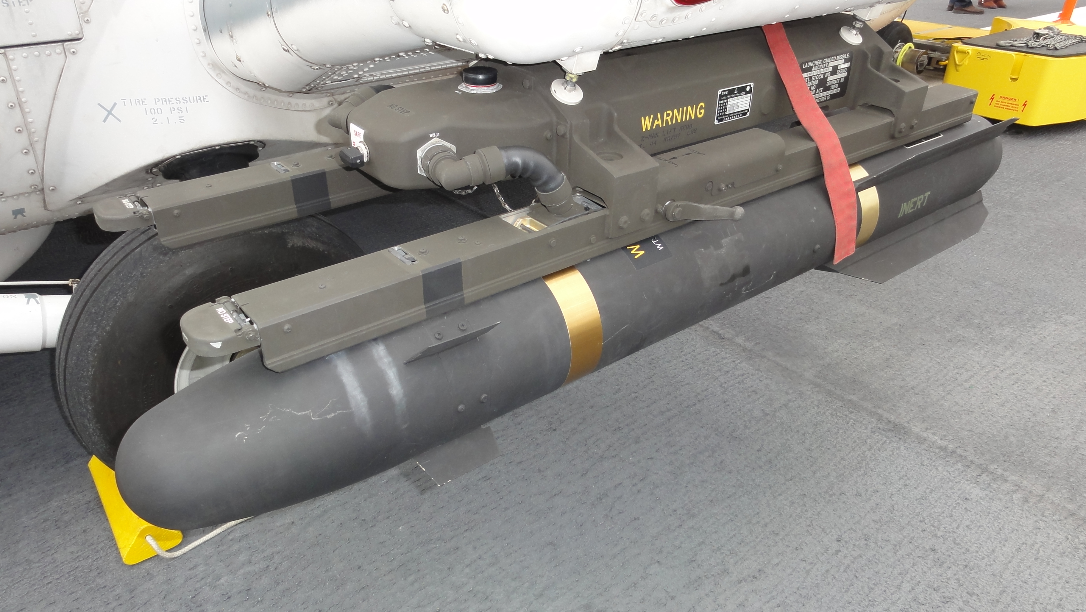 SH-60K哨戒ヘリ搭載のAGM-114MヘルファイアⅡ対艦ミサイル。護衛艦いせ艦上にて。Sony DSC-HX5V